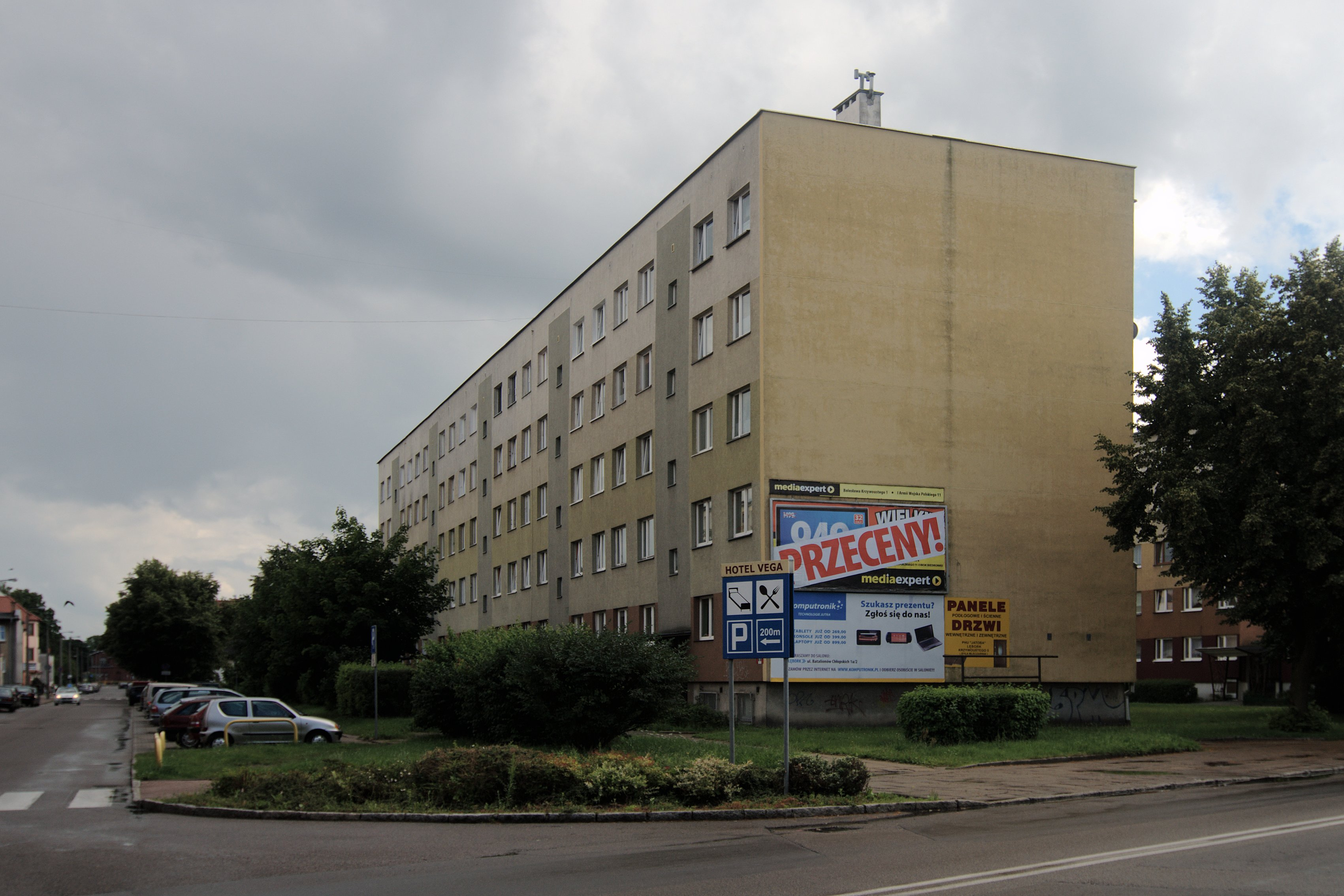 Lębork. Ulica 10 Marca. Budynek nr 23-25.